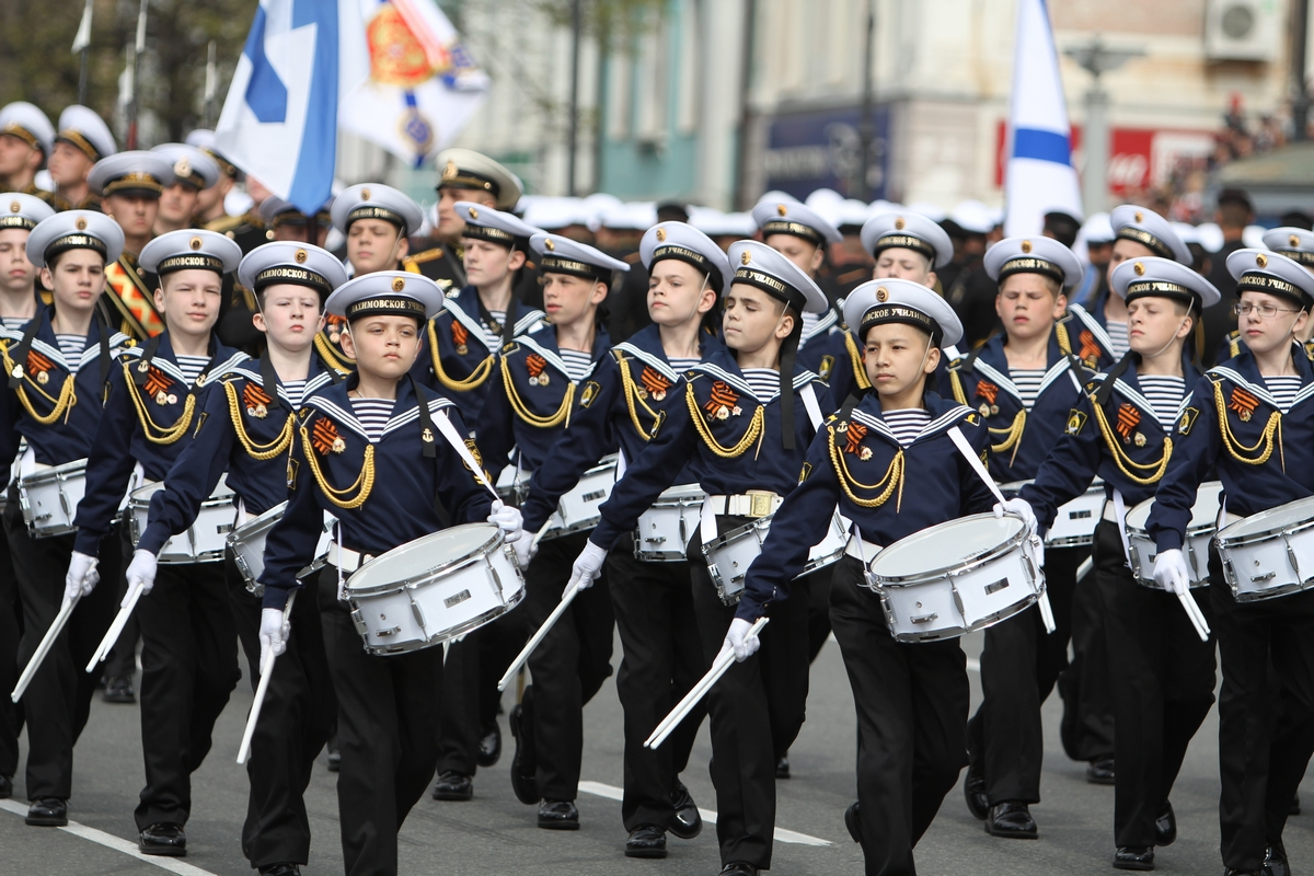 9 мая во Владивостоке праздничные мероприятия начались в 09.00 с торжественного подъема Государственного и Андреевского флагов перед штабом Тихоокеанского флота. В 10.00 в центре Владивостока, на улице Светланской, состоялся военный парад, в честь Дня Победы, который приветственным словом предварил командующий ТОФ адмирал Сергей Авакянц. При исполнении Государственного гимна Российской Федерации впервые в столице Приморского края прозвучал артиллерийский салют, который производился из салютных орудий на Корабельной набережной